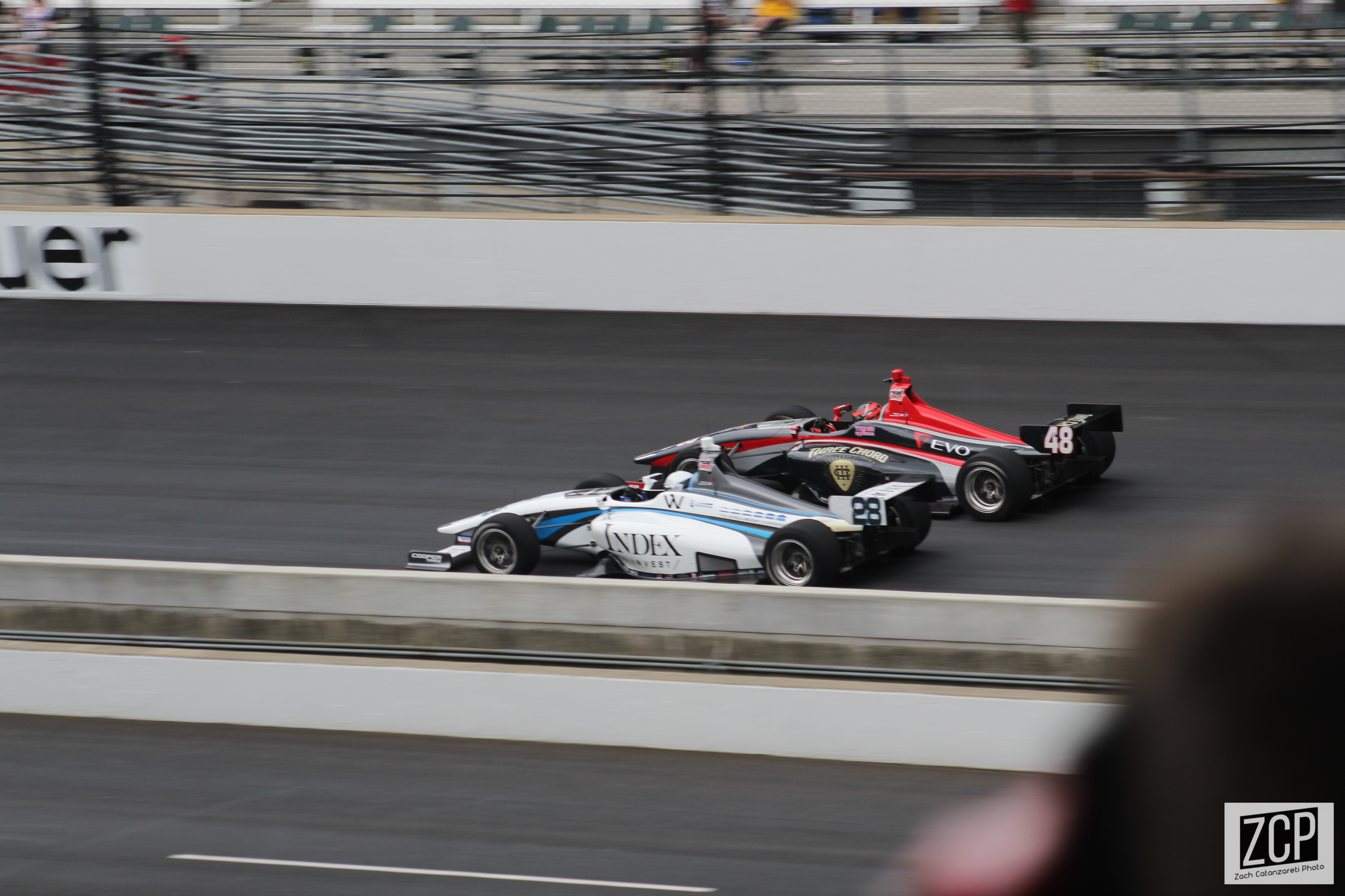 2019 Indianapolis 500